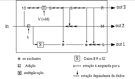 Fun¸c˜ao E de transforma¸c˜ao chaveada principal